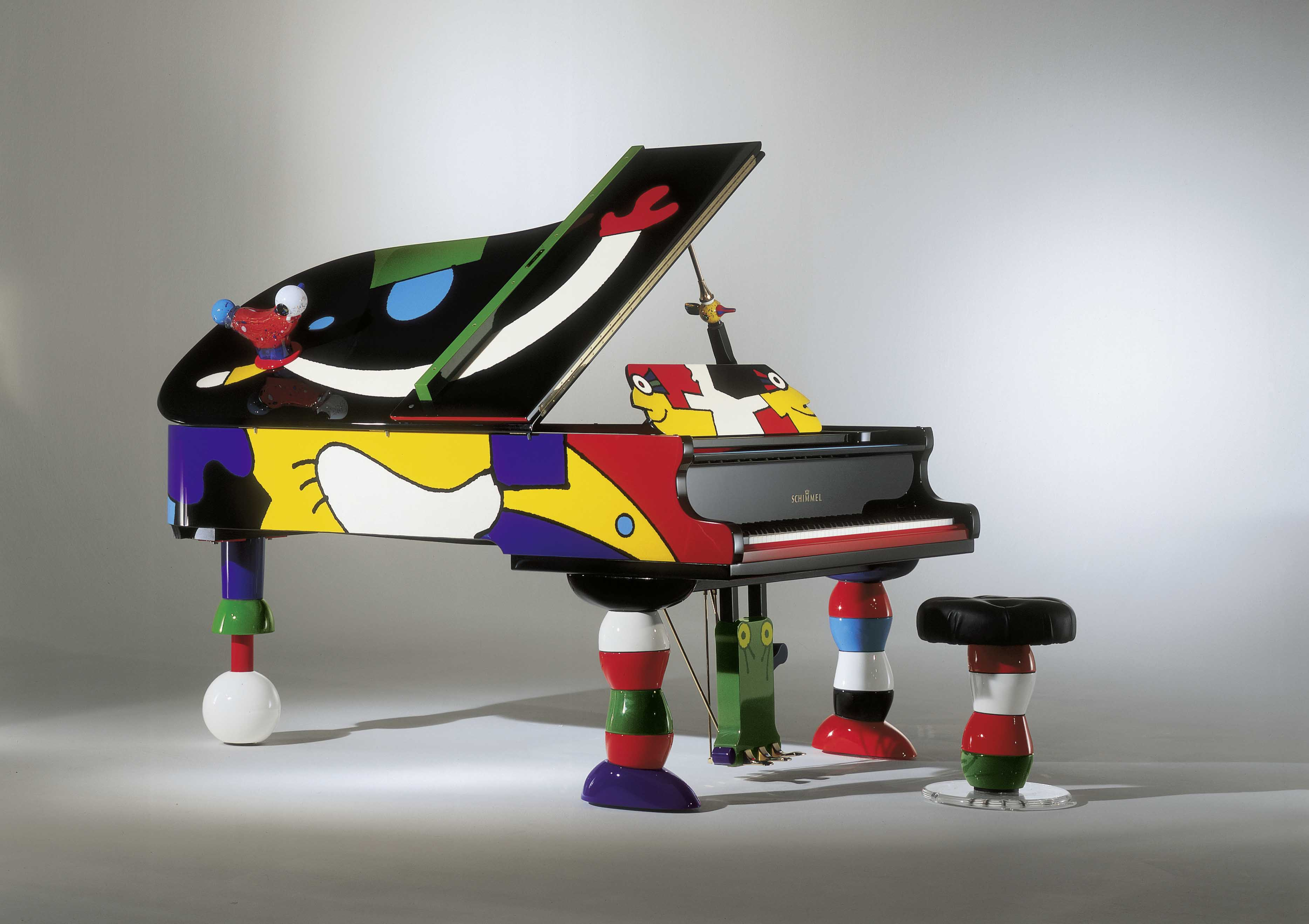 Schimmel Otmar Alt Flügel, Schimmel Art-Collection